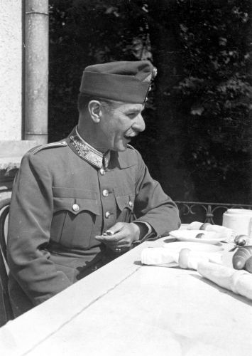 Decleva Zoltán még vezérőrnagyként, az I. hadtest parancsnoka (23860).